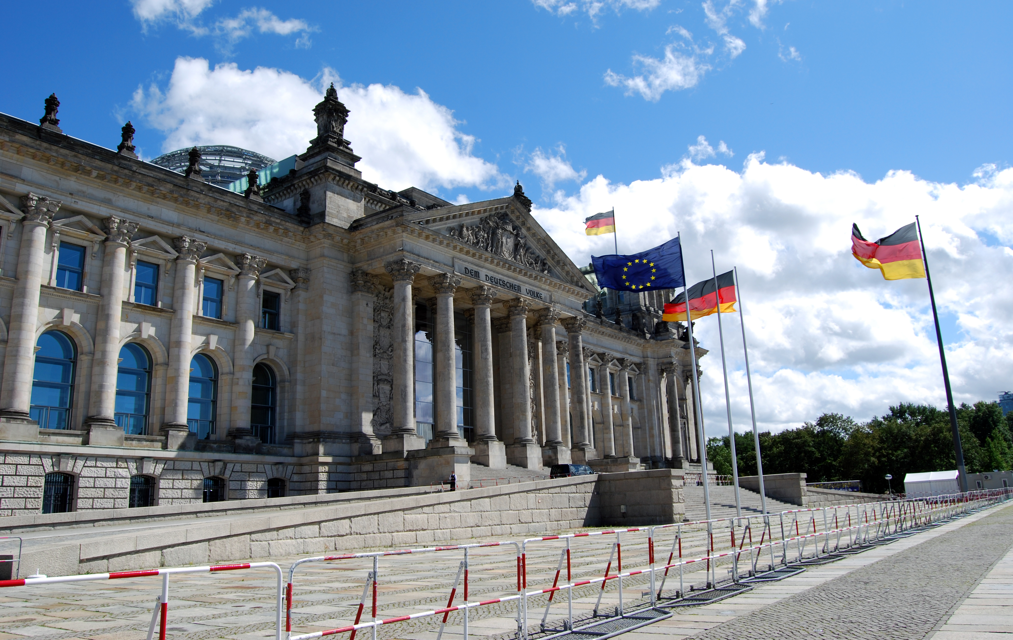 Reichstag (building)